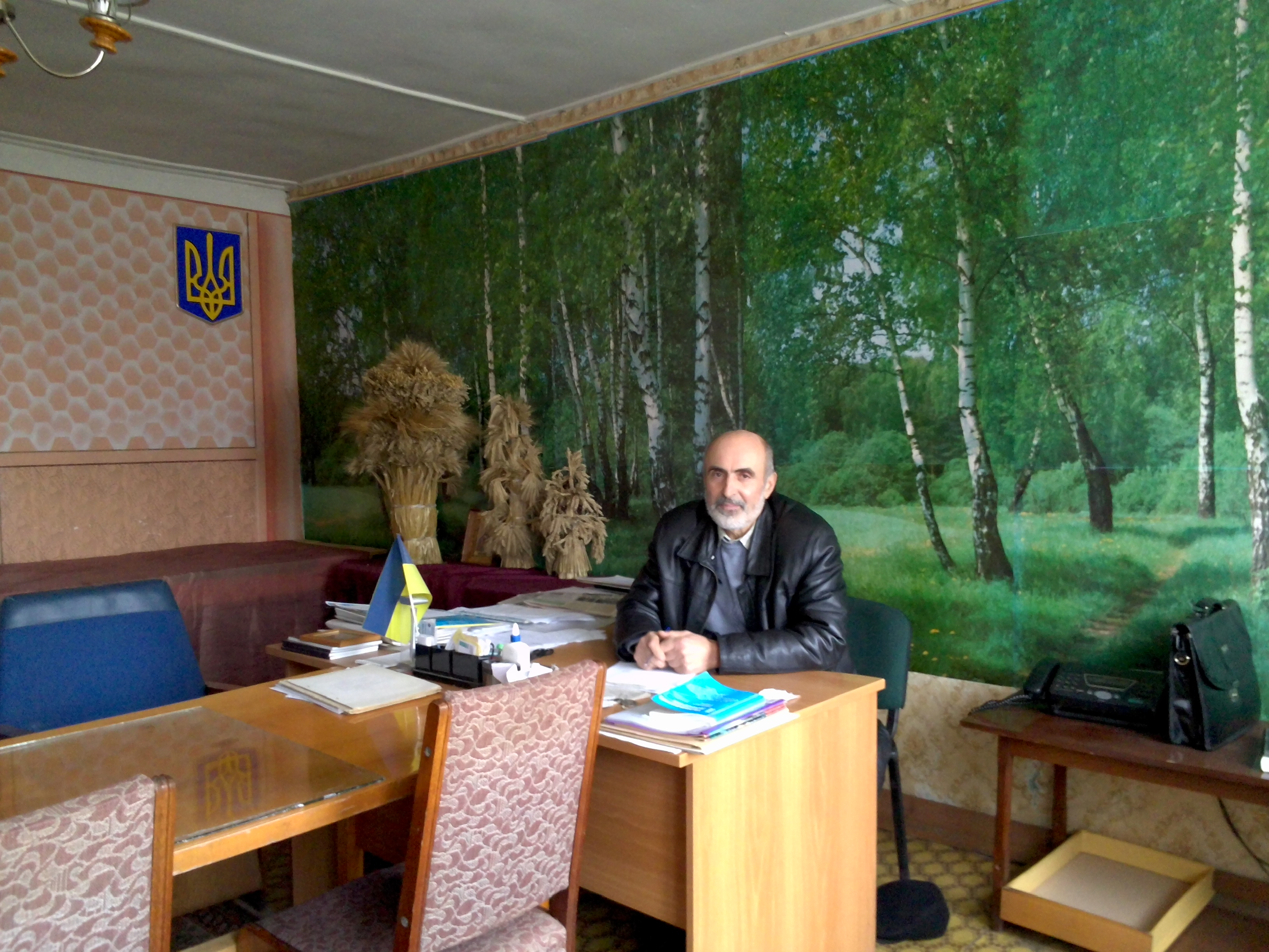 Голова Костянтинівської сільської ради Дубина Василь Маркович